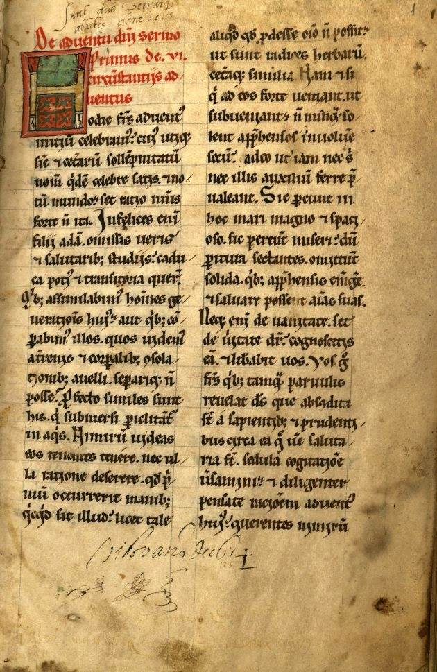 Bernard of Clairvaux, Sermons. Spanish manuscript. 13th century. Incipit: De adventu domini sermo primus